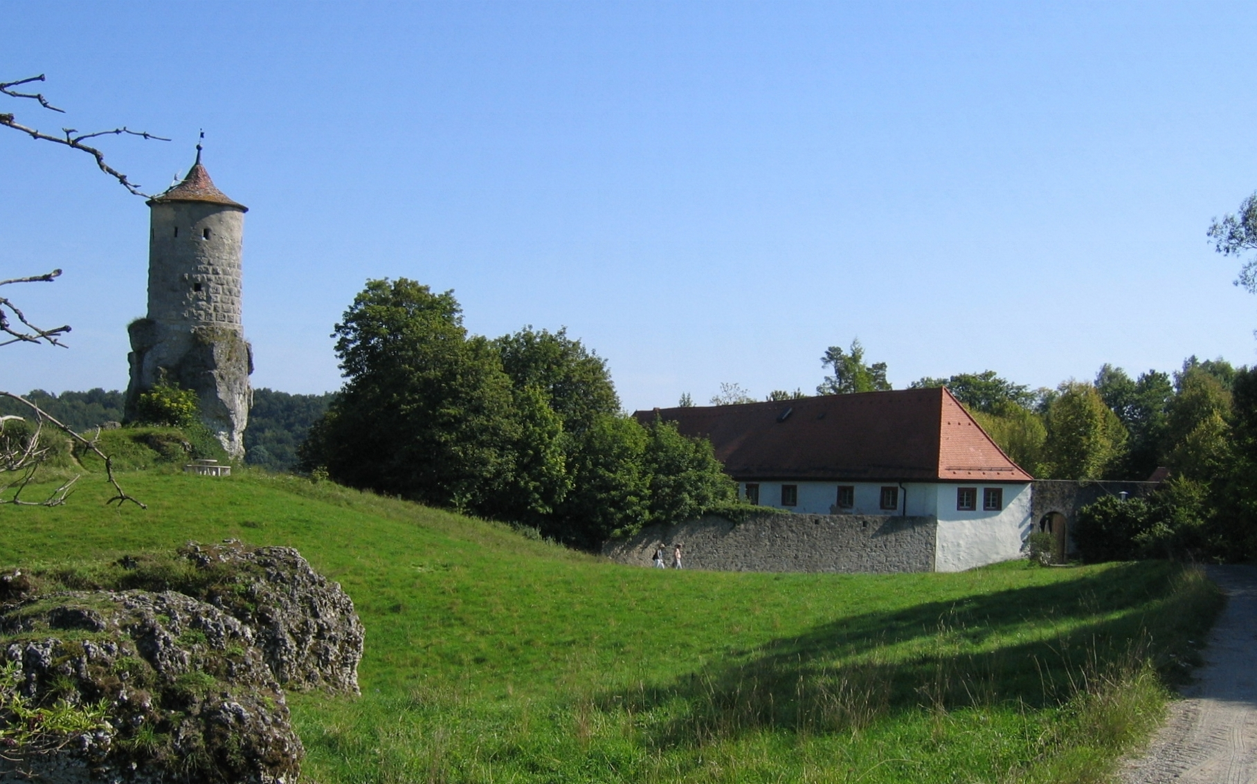 Burg Waischenfeld und Wehrturm „Steinerner Beutel“ in Waischenfeld, Deutschland